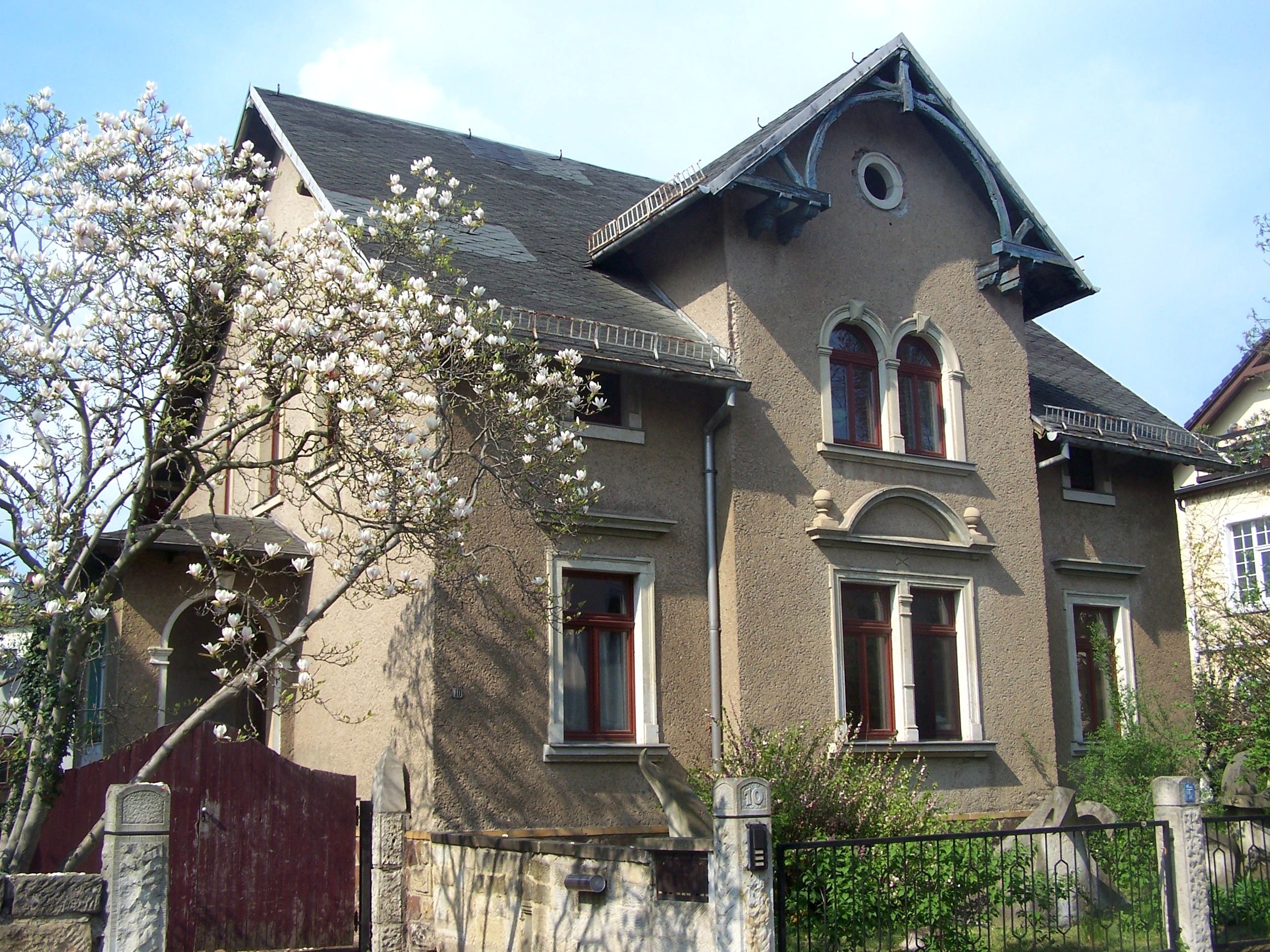 Villa Rosa, Hellerstr. 10 in Radebeul